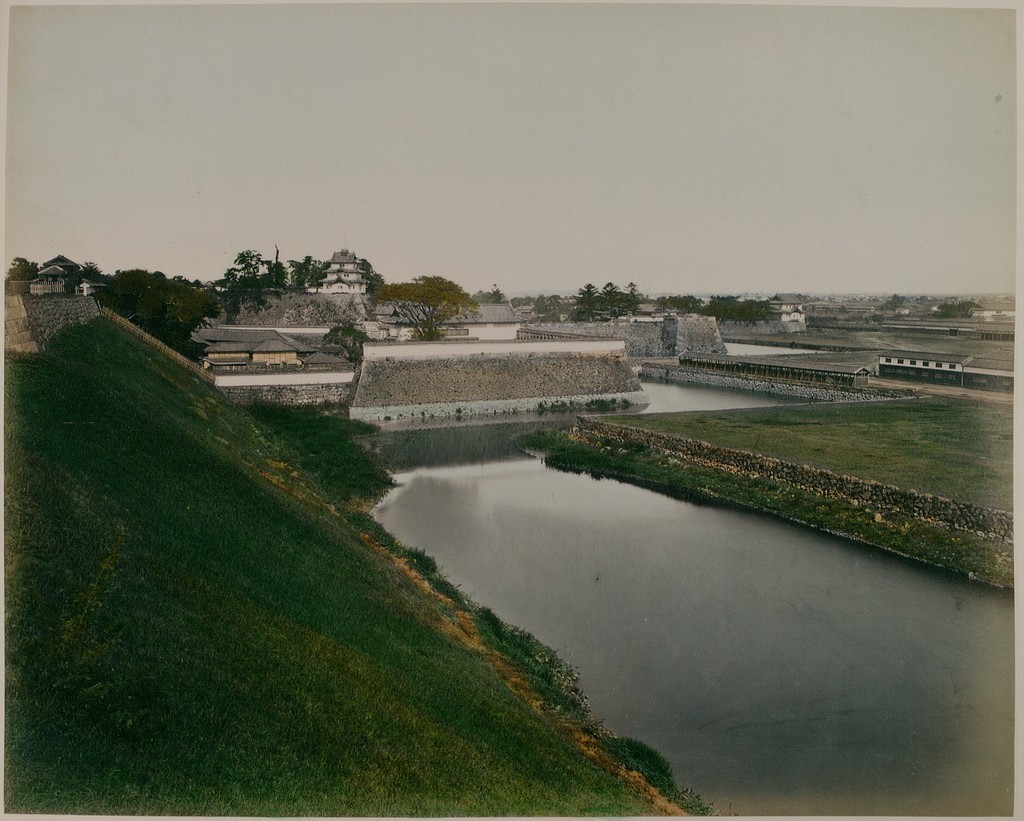 Adolfo FARSARI - "Sans titre" - Photographie sur papier albuminé réhaussée de pigments - 24.6 x 19.6 cm - 1979.94.21.